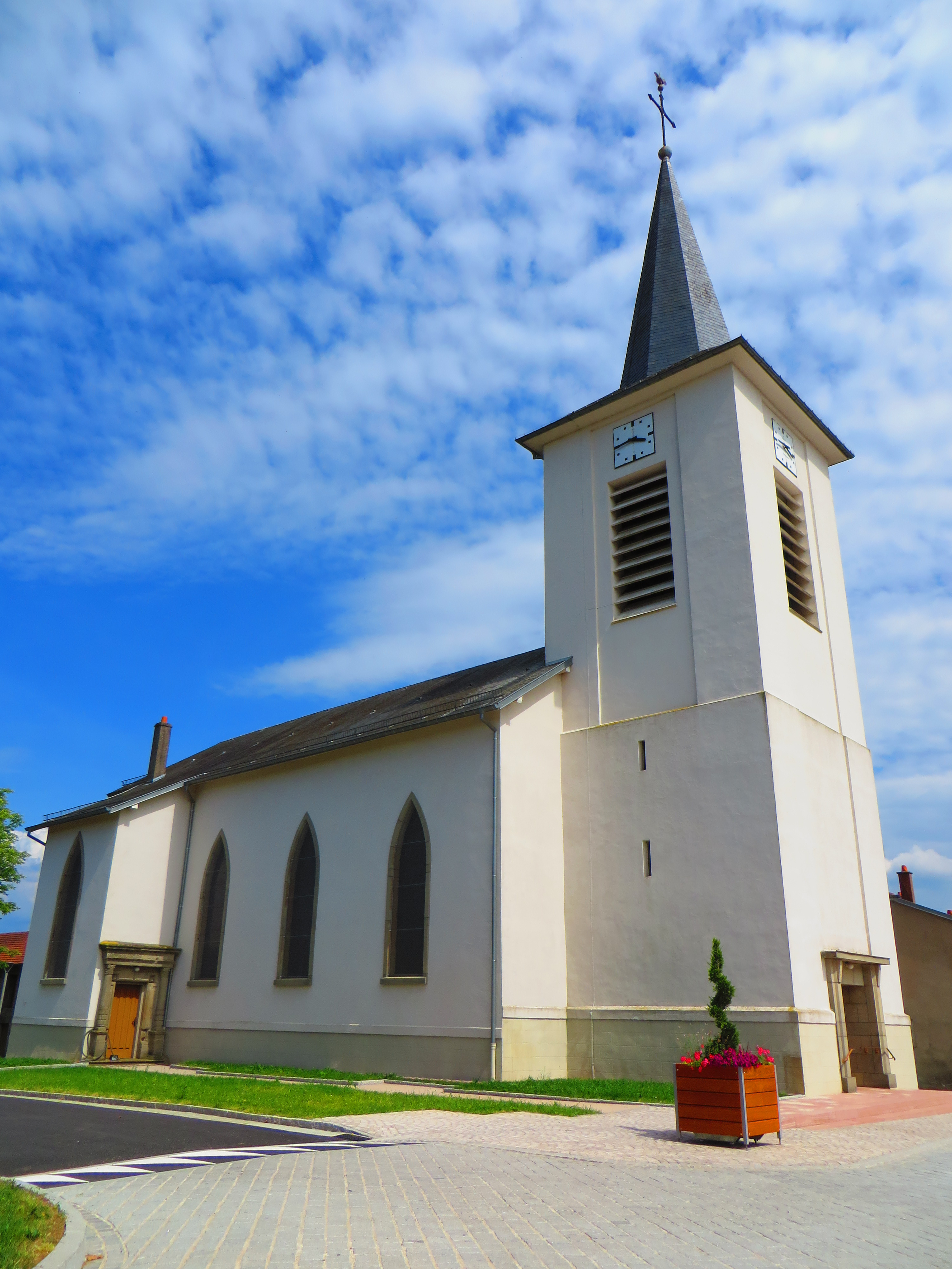 Hattigny eglise